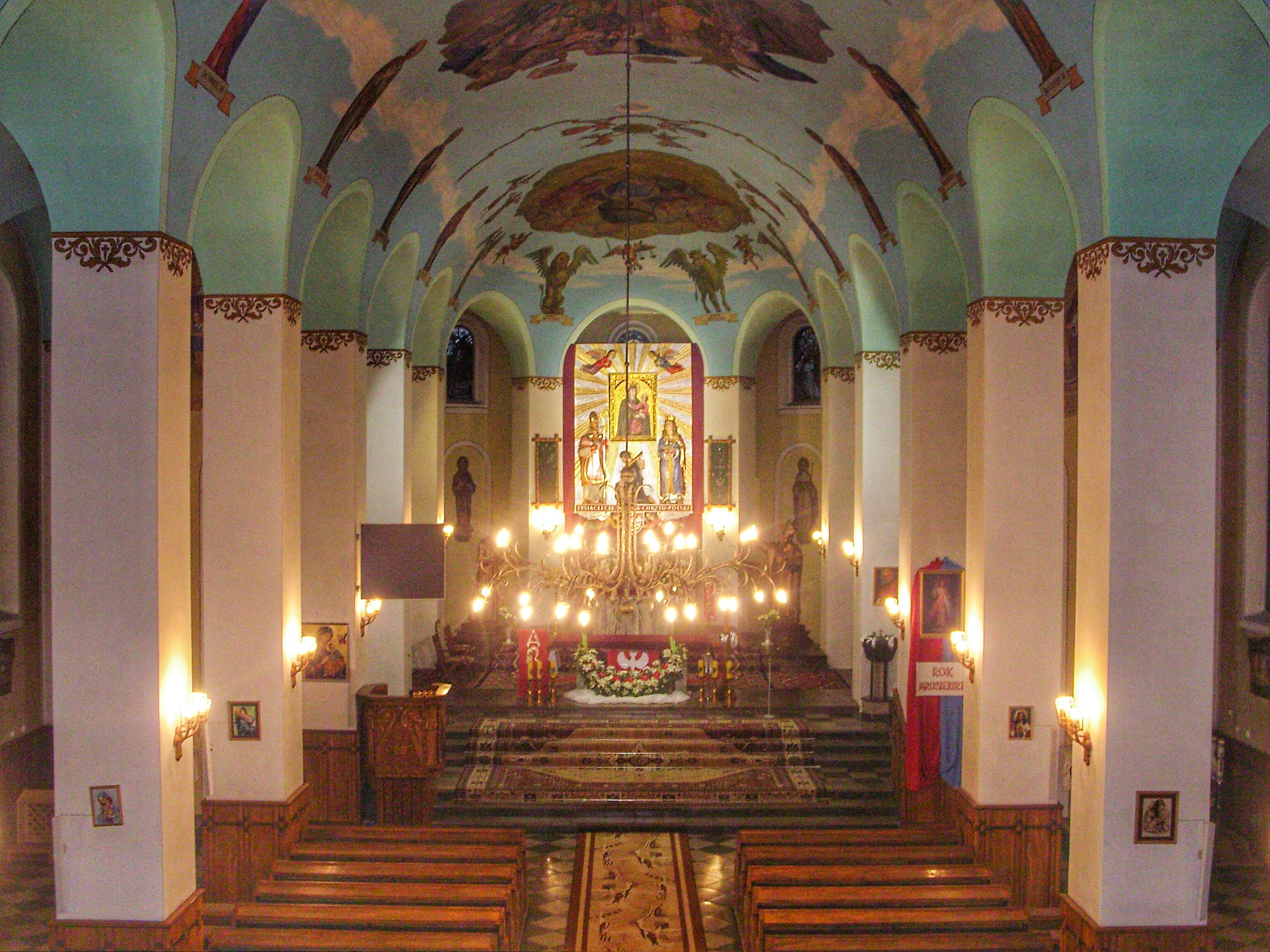 Nocne wnętrze kościoła Imienia Maryi w Bączalu Dolnym (diecezja rzeszowska)